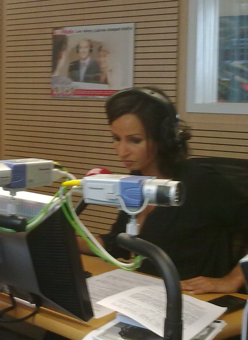 Hakima Darhmouch dans les studios de RTL en Sept 2010